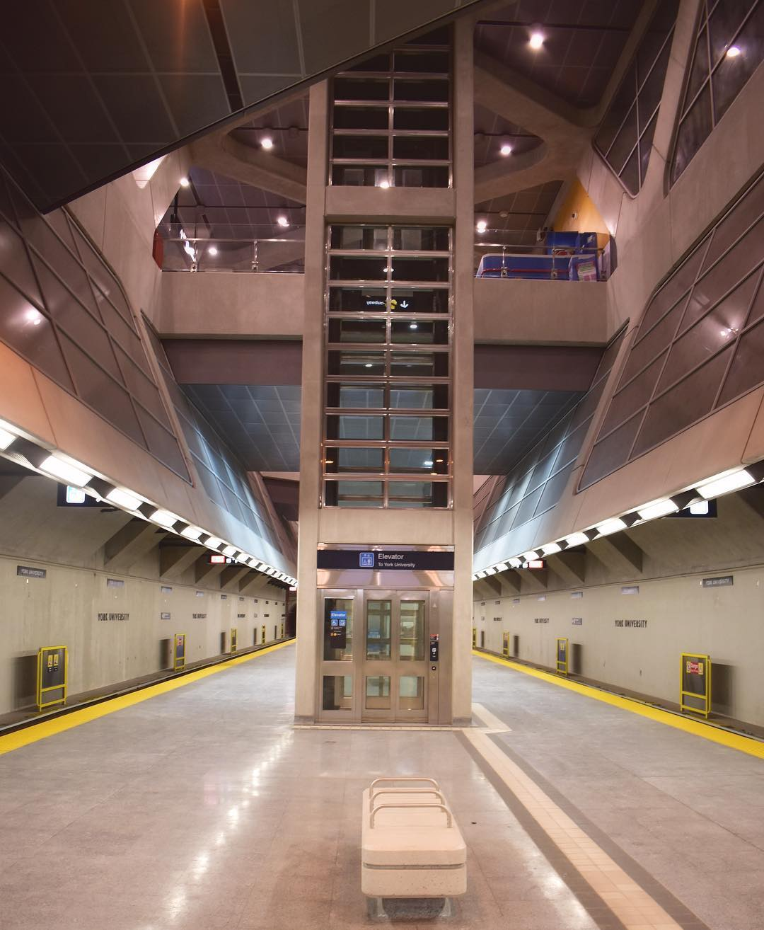 via Instagram ift.tt/2znw86z